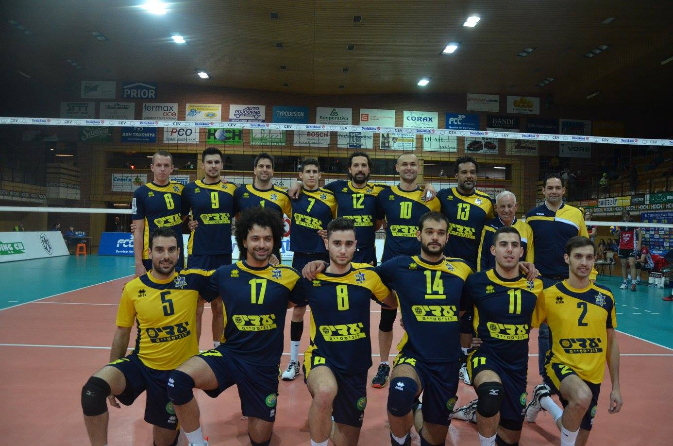 מכבי תל אביב נגד בודיוביצה, שמינית גמר גביע האתגר